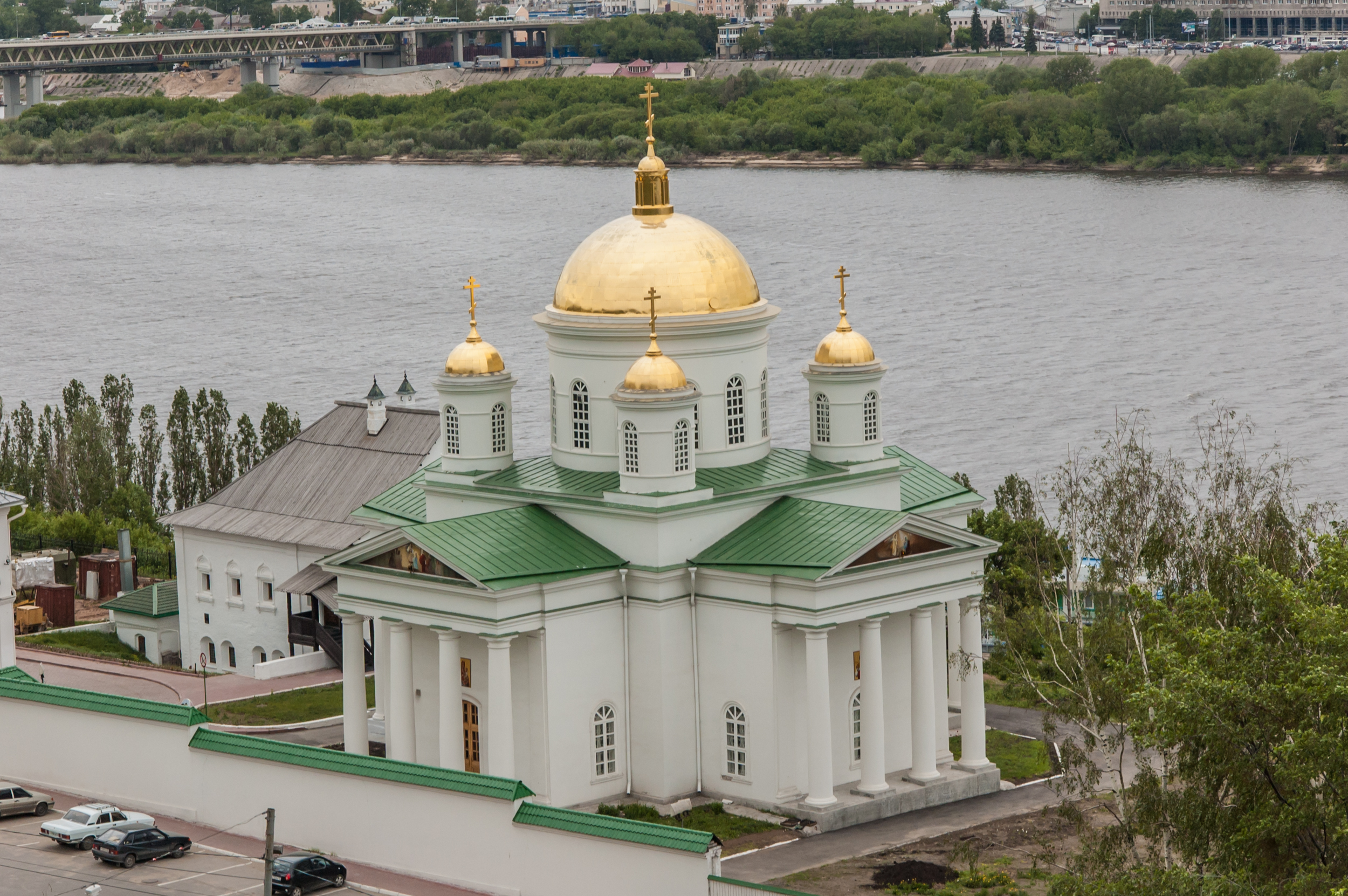 Церковь святителя Алексия, митрополита Московского: улица Черниговская, 7а, Нижний Новгород, Нижегородская область